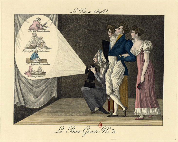 Gravure coloriée à la main de la série Le Bon Genre publiée par Pierre de la Mésangère.